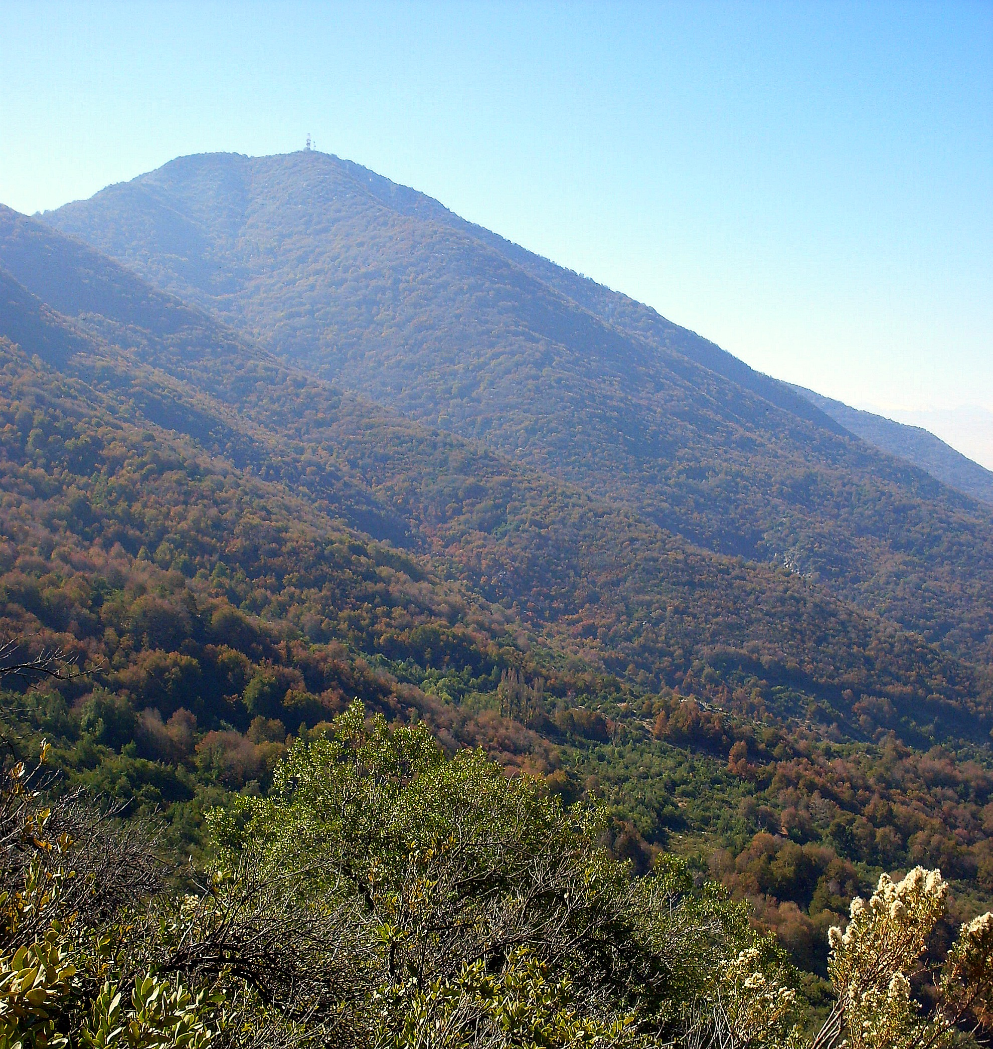 Ladera de umbría del cerro El Roble, ubicado en el límite entre la Región Metropolitana de Santiago y la Región de Valparaíso, Chile. Como su nombre lo dice, se puede apreciar el color rojizo del follaje de los robles que cubren esta ladera. En su cima se observa la estación astronómica y meteorológica del Departamento de Ciencias Astronómicas de la Universidad de Chile. This is a photo of a national monument in Chile: 899